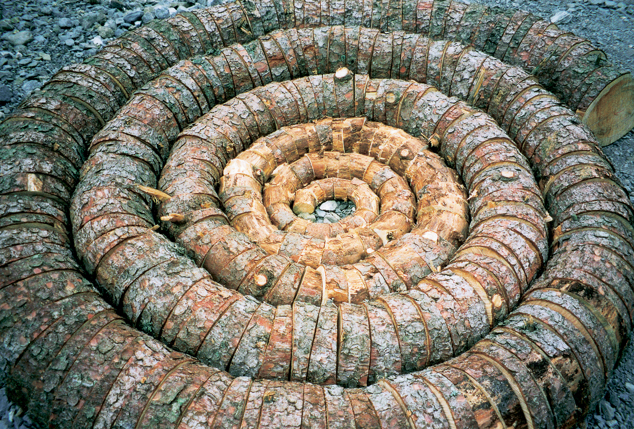 „Fichte 280-teilig“ (Zustand IV/V) eine vom Wind gefällte Fichte in Scheiben zersägt und in Varianten in die Umgebung eingefügt. Ort: Oeschinensee bei CH Kandersteg.